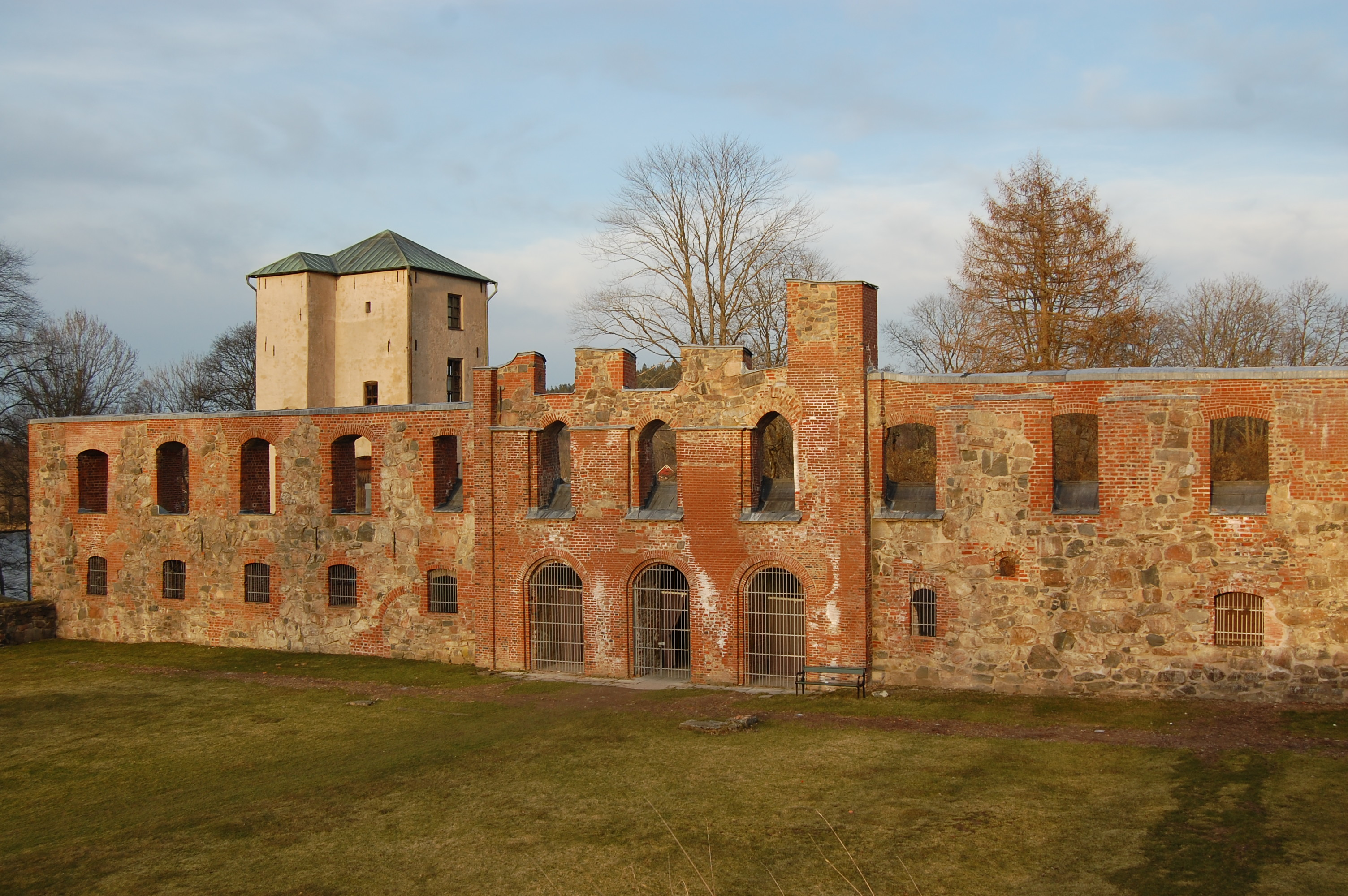 Gräfsnäs slott. Ladda ner bilden! Ni får för mig.